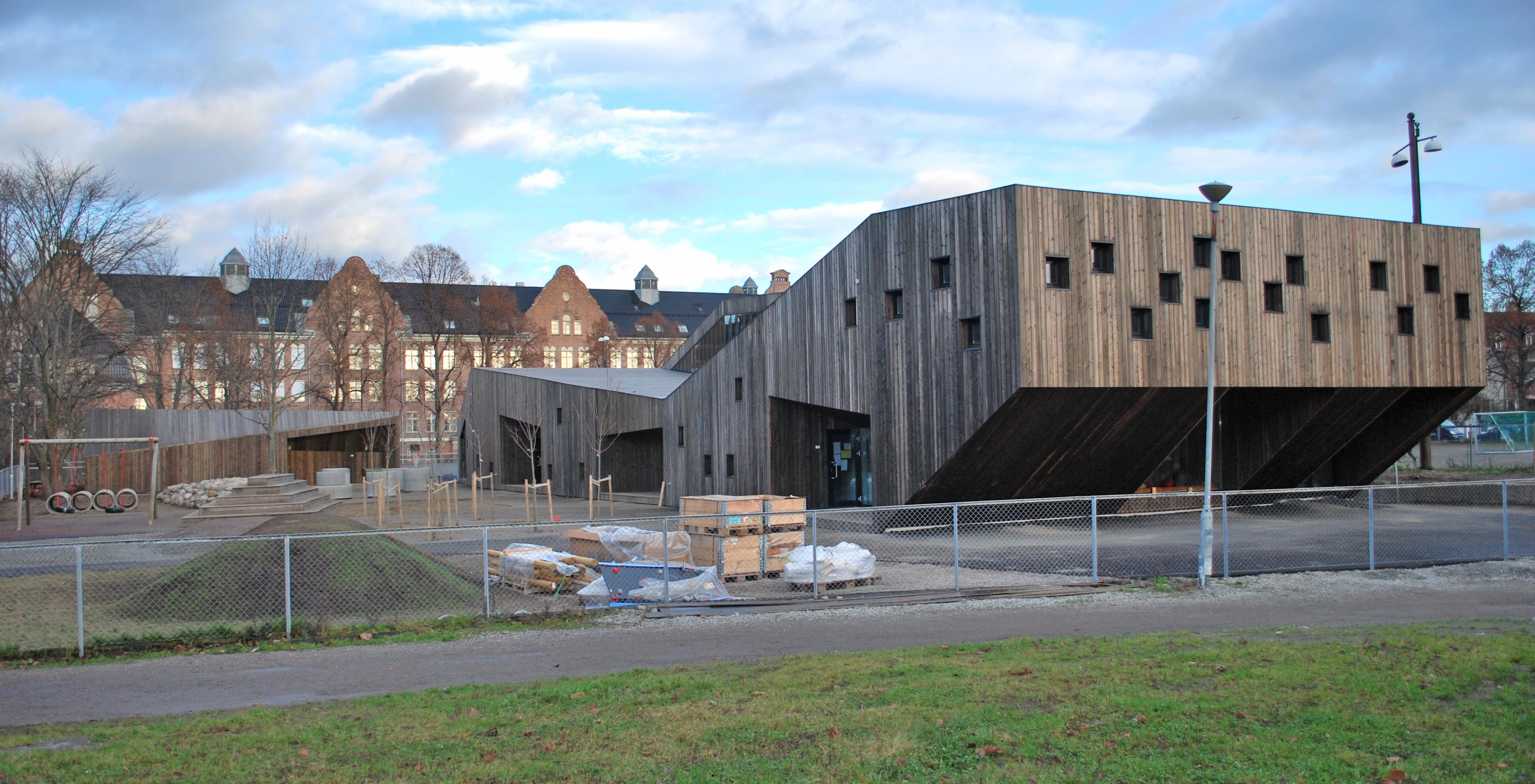 Fagerborg menighetsbarnehage, ny 2011. Reiulf Ramstad ved Reiulf Ramstad Arkitekter (RRA).